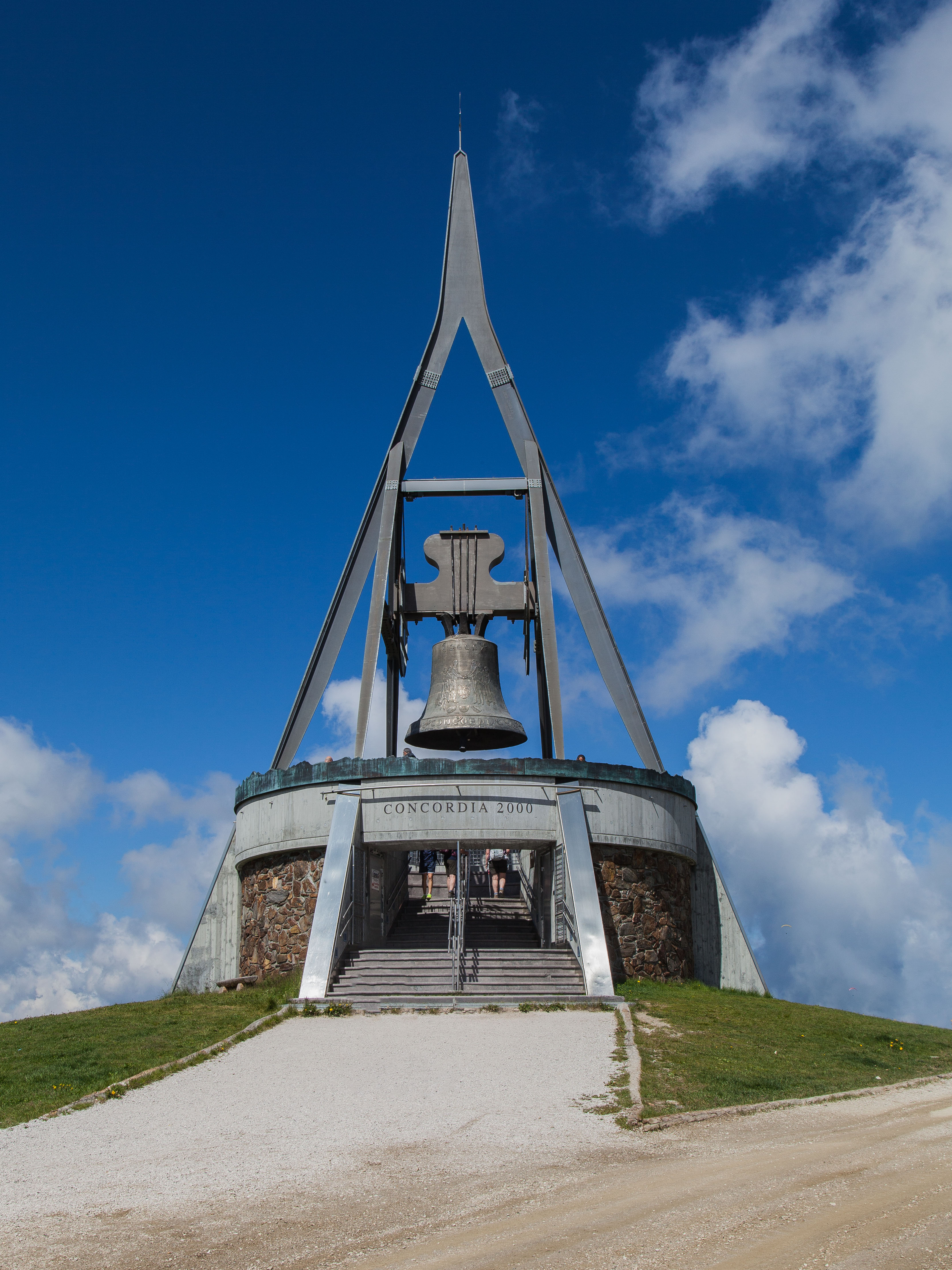 Kronplatz - Friedensglocke Concordia 2000